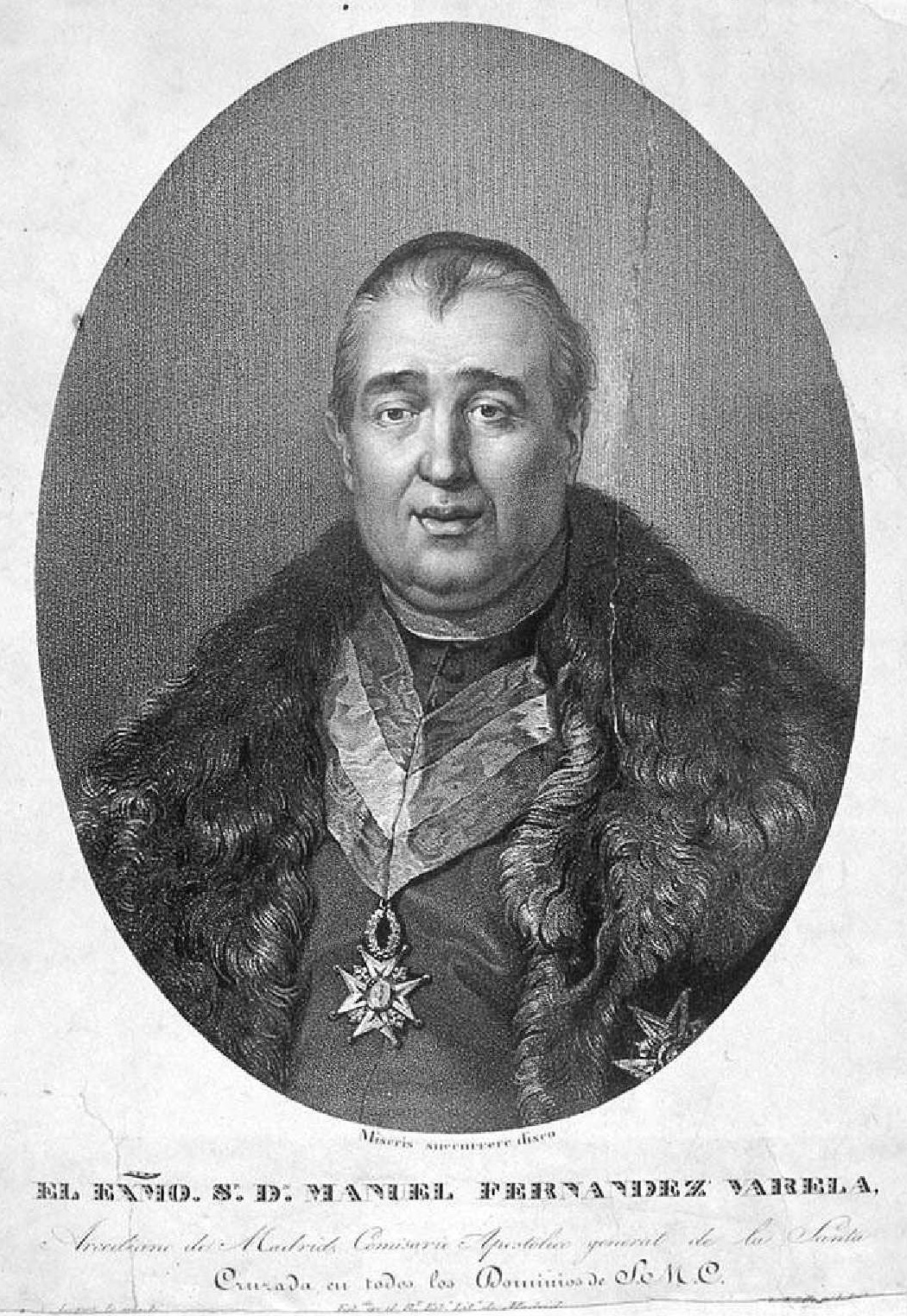 Retrato de Manuel Fernández Varela según Vicente López, litografía